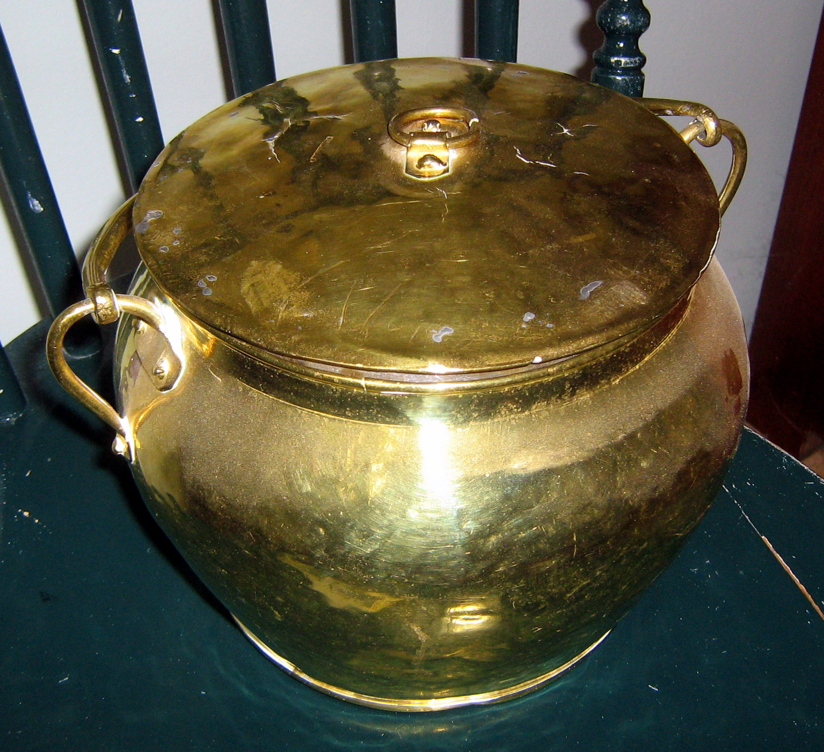 Mässingskruka, Skultuna ca 1850.